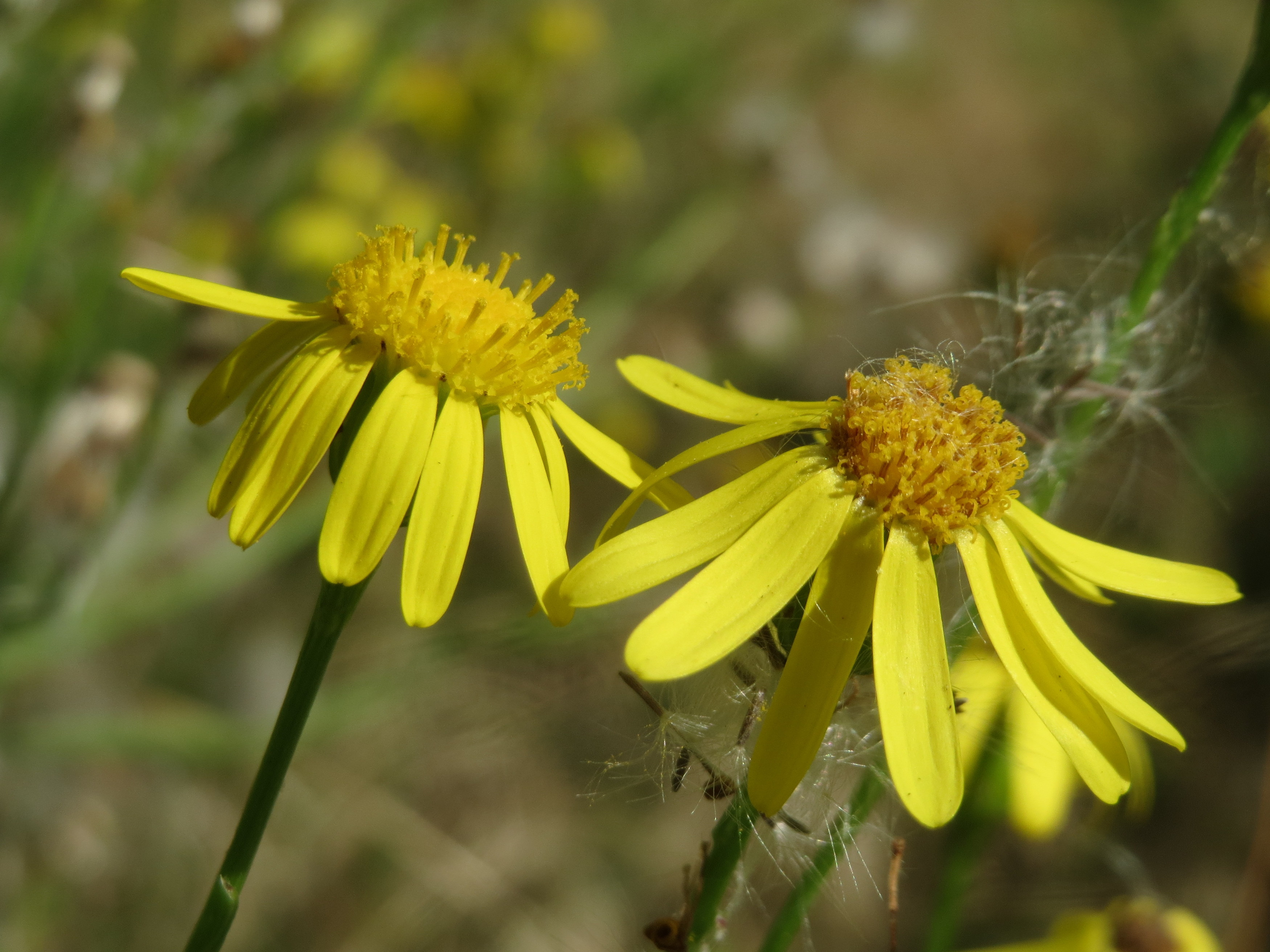 Schmalblättriges Greiskraut (Senecio inaequidens) in Hockenheim